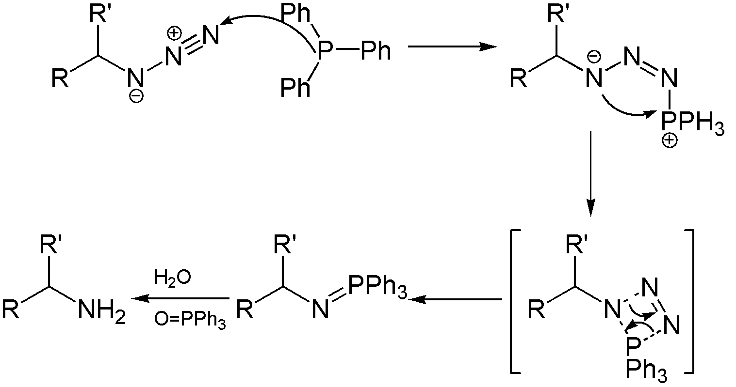 Mechanismus der Staudinger-Reaktion